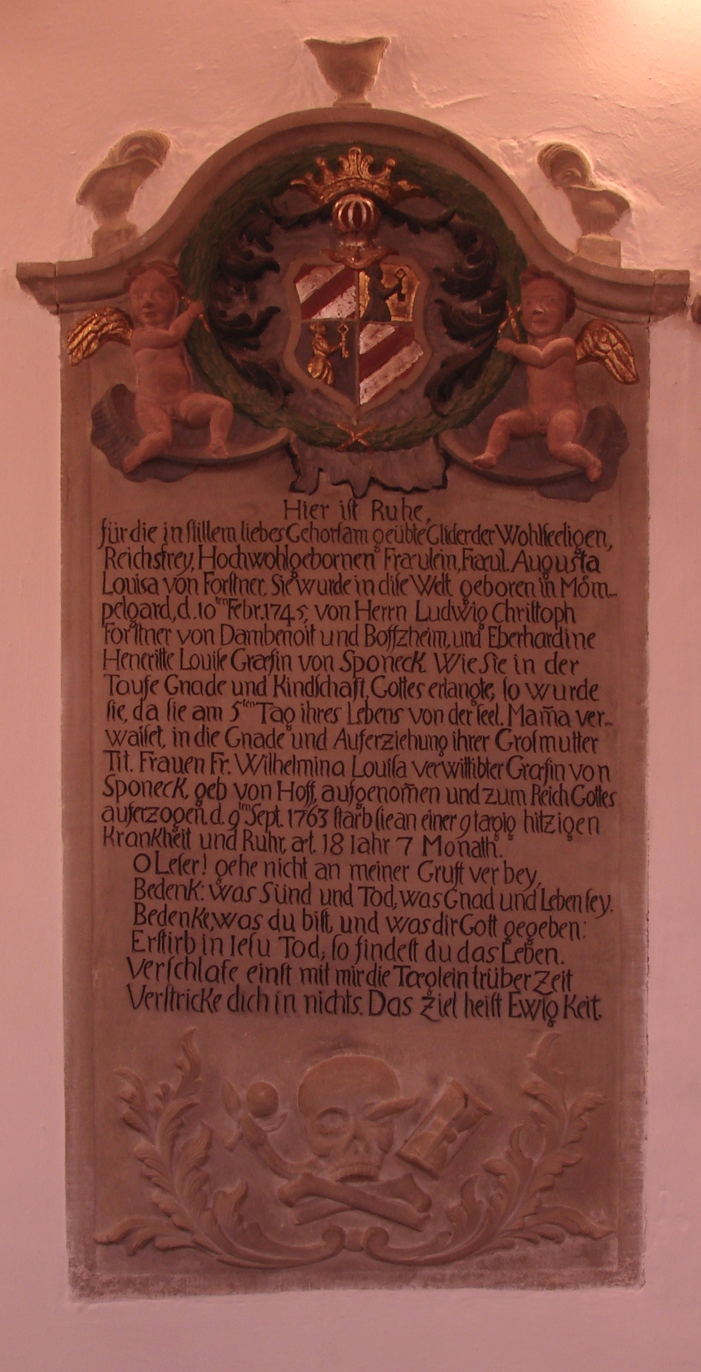 Freiberg am Neckar, epitaph for Louisa von Forstner in the Nikolaus church